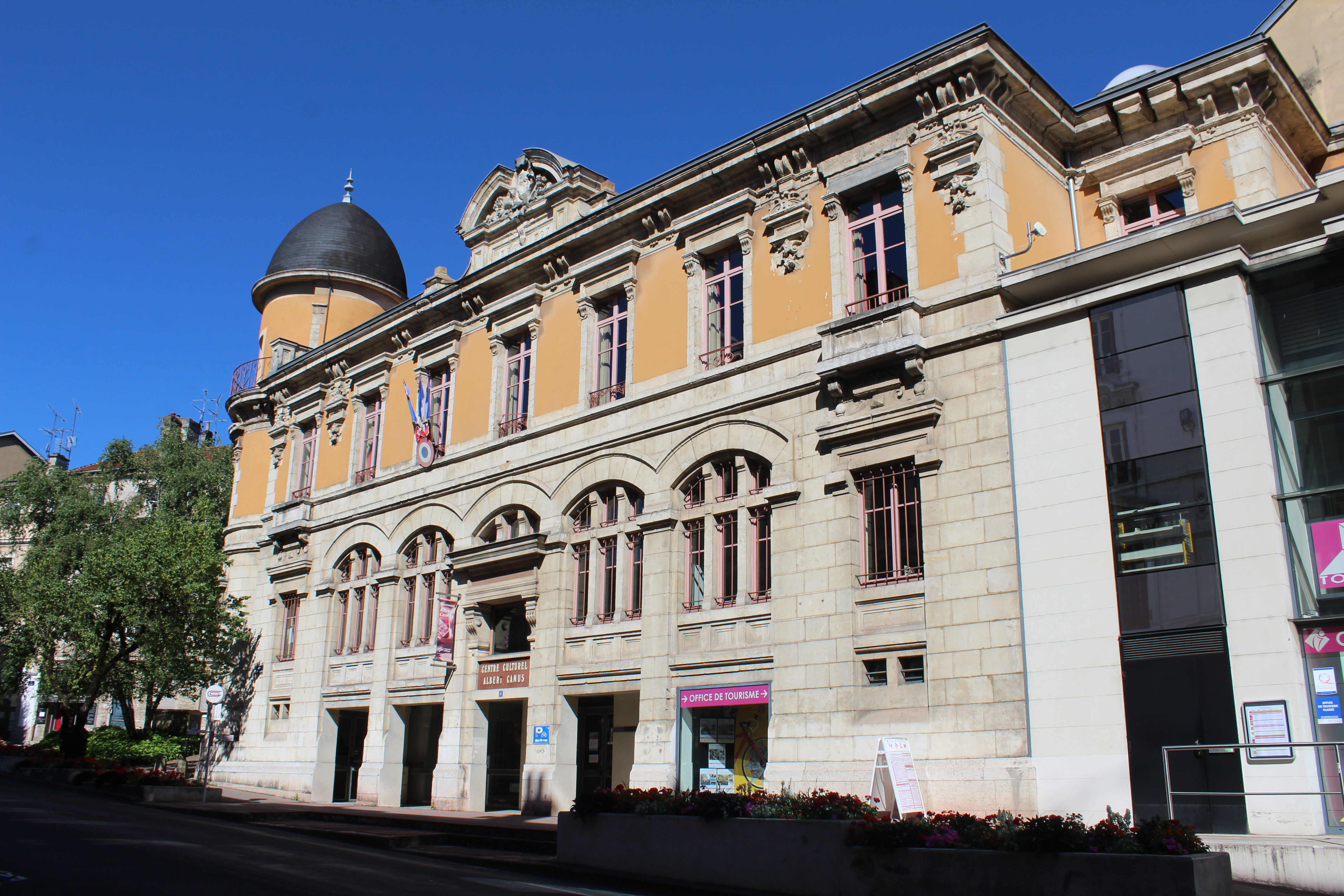 Centre culturel Albert Camus de Bourg-en-Bresse.